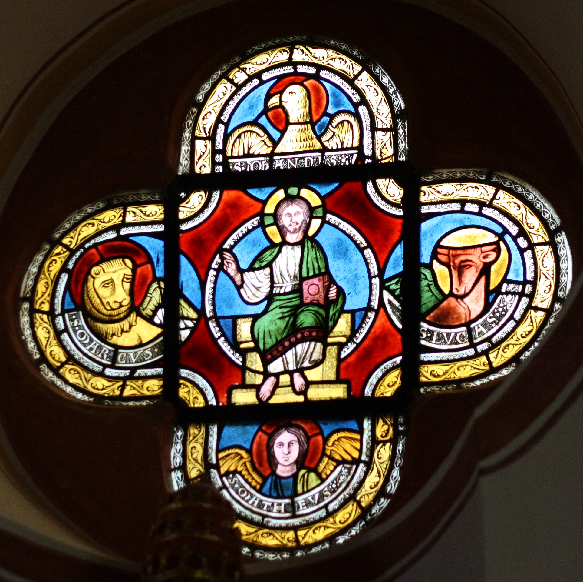 Bleiglasfenster (Ausschnitt) in der katholische Pfarrkirche St. Petrus in Peterslahr, Darstellung: Symbole der Evangelisten und Christus